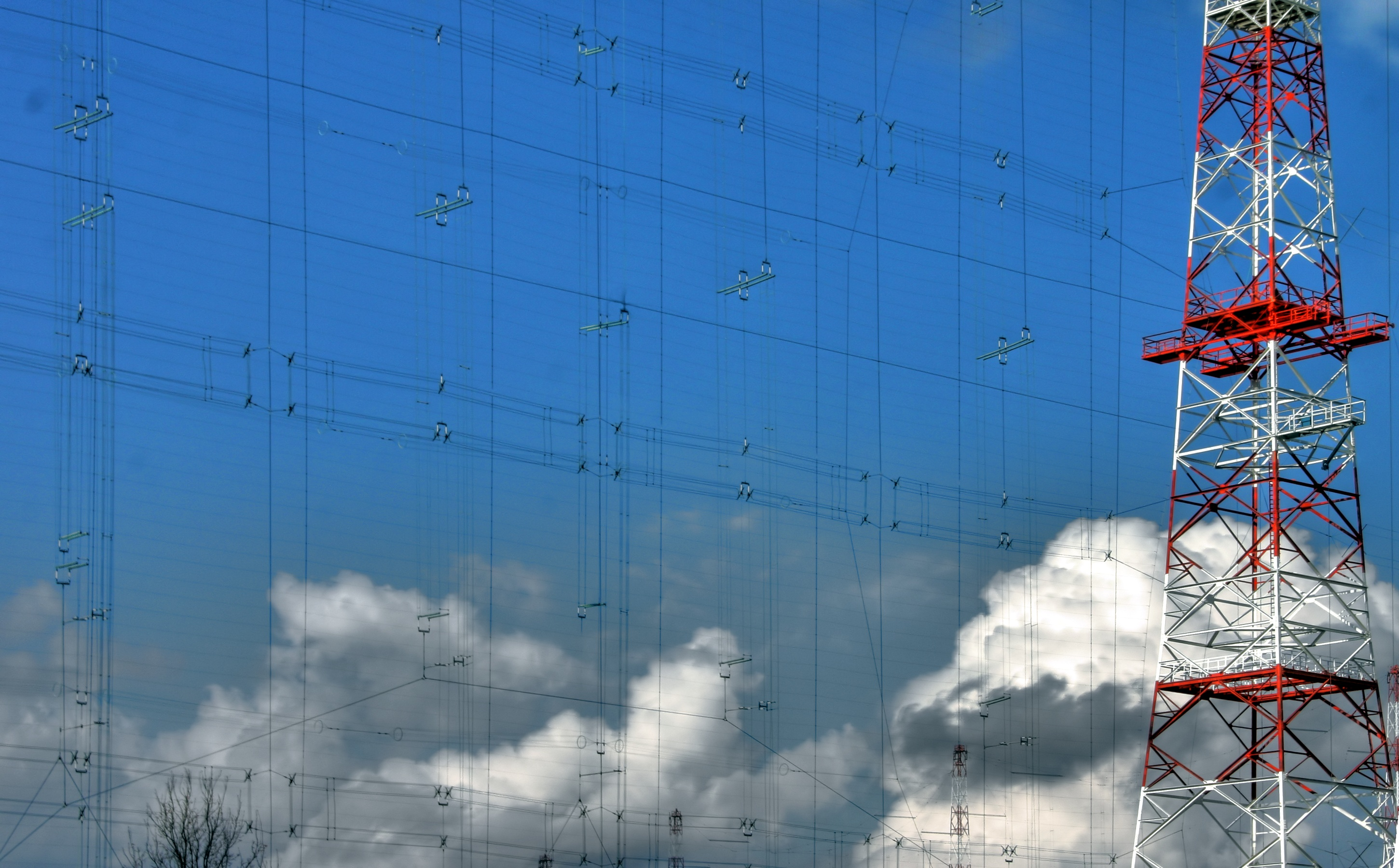 Kurzwellenzentrum Jülich. Zum 1. Januar 2008 wurde die Sendeanlage von T-Systems an die religiöse Sendeanstalt CVC / Christan Vision übergeben und im Laufe des Jahres 2010 abgerissen.